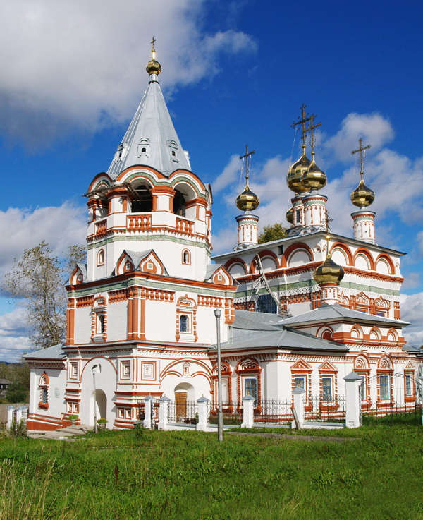 Богоявленская церковь после реставрации 2005 года. город Соликамск